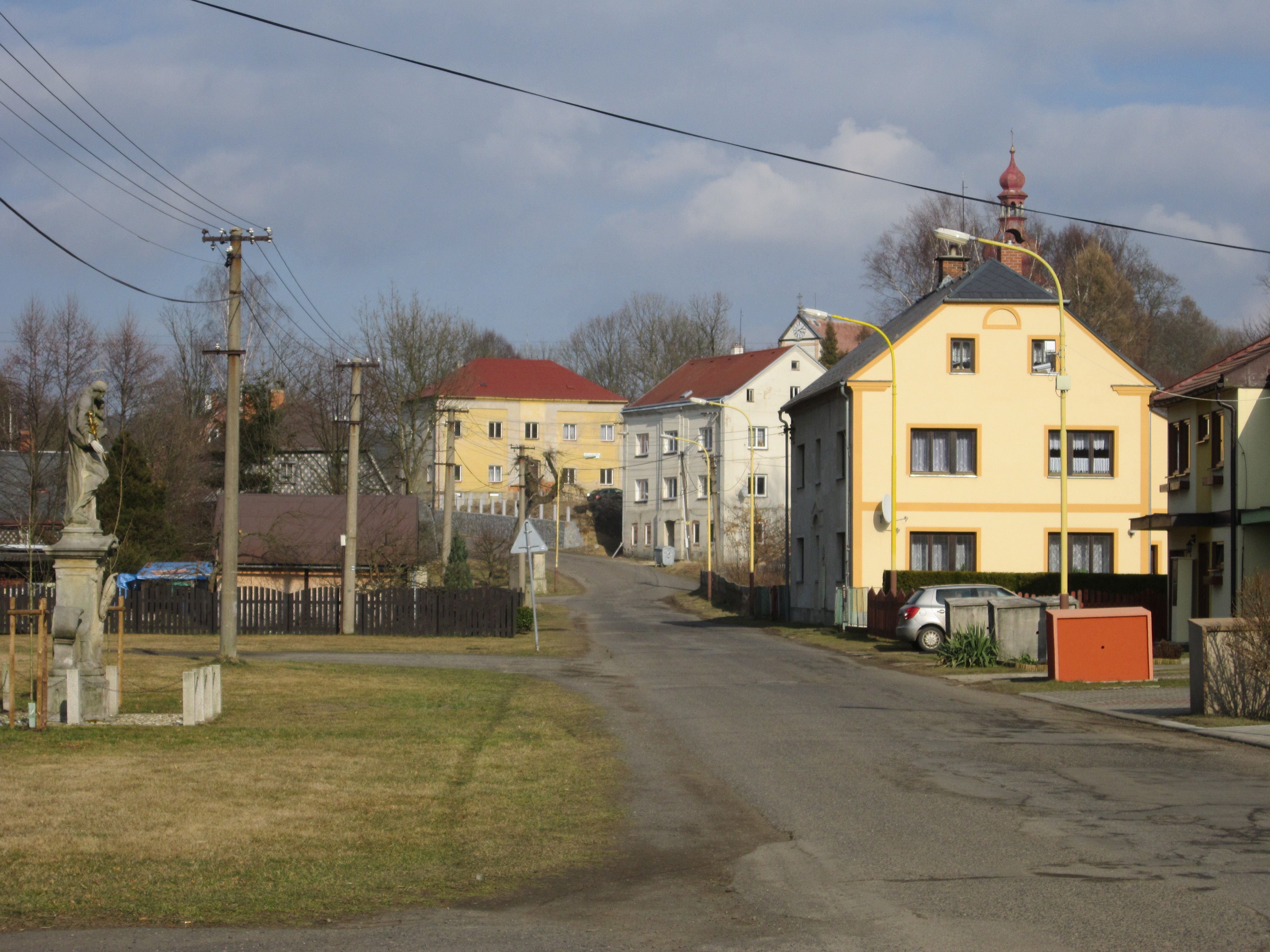 Lipová u Šluknova (fotka od radnice)